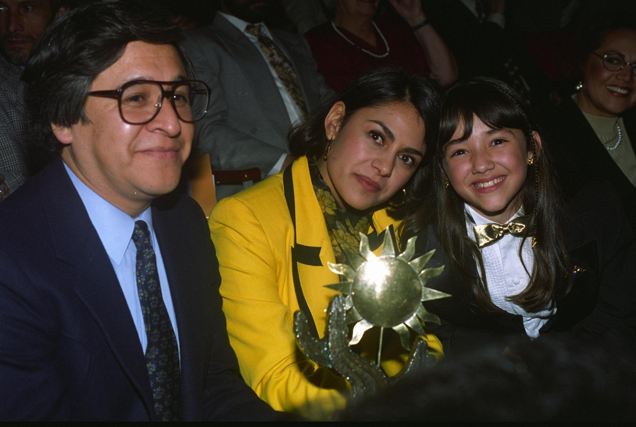 1997 XII Muestra de Cine Mexicano en Guadalajara Ceremonia de clausura y premiación Juan Antonio de la Riva Claudia Goytia Sherlyn Montserrat González.